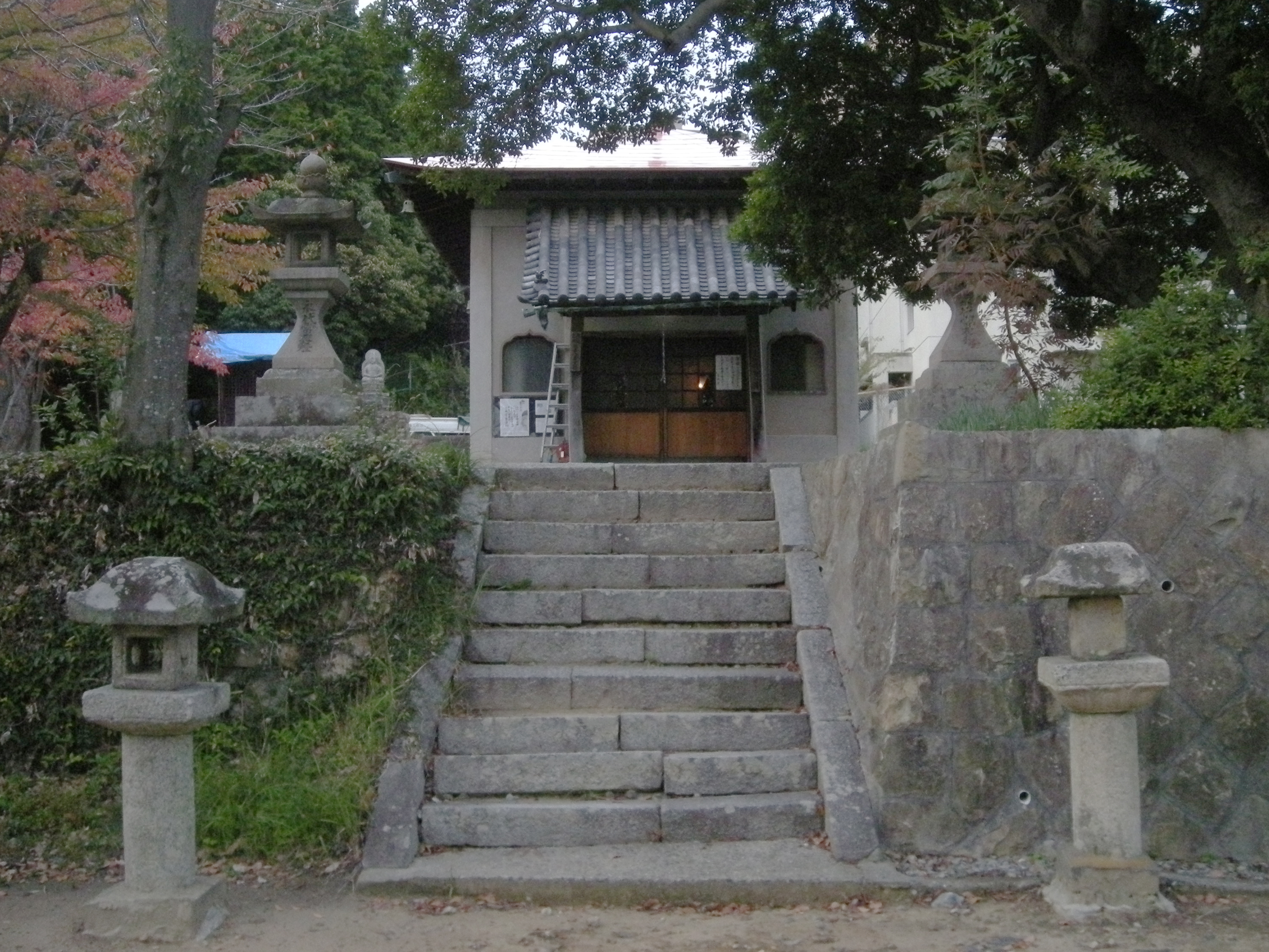 宝珠院 (箕面市) 奥の院